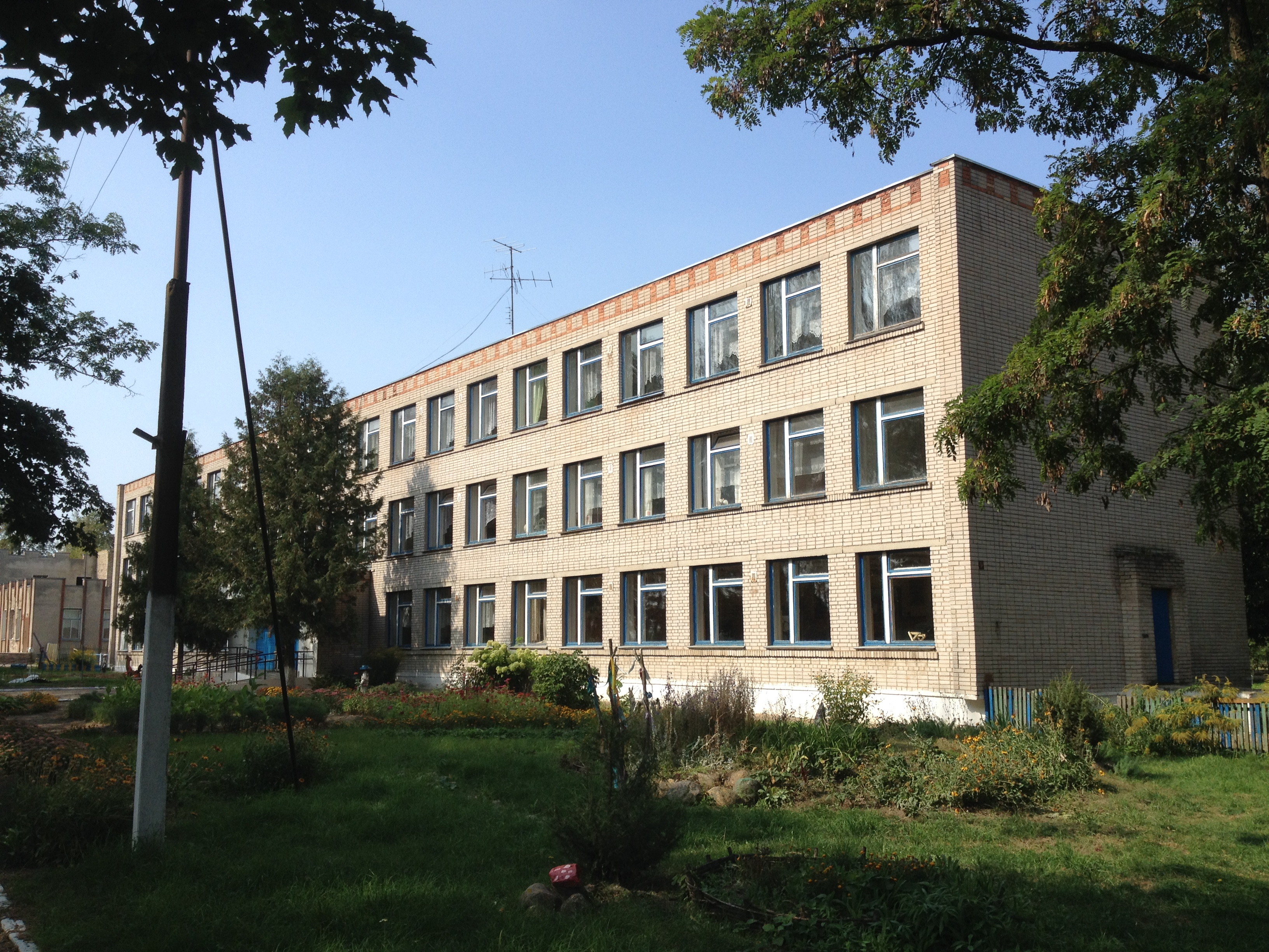 Szkoła we wsi Paustyń w rejonie słuckim Białorusi